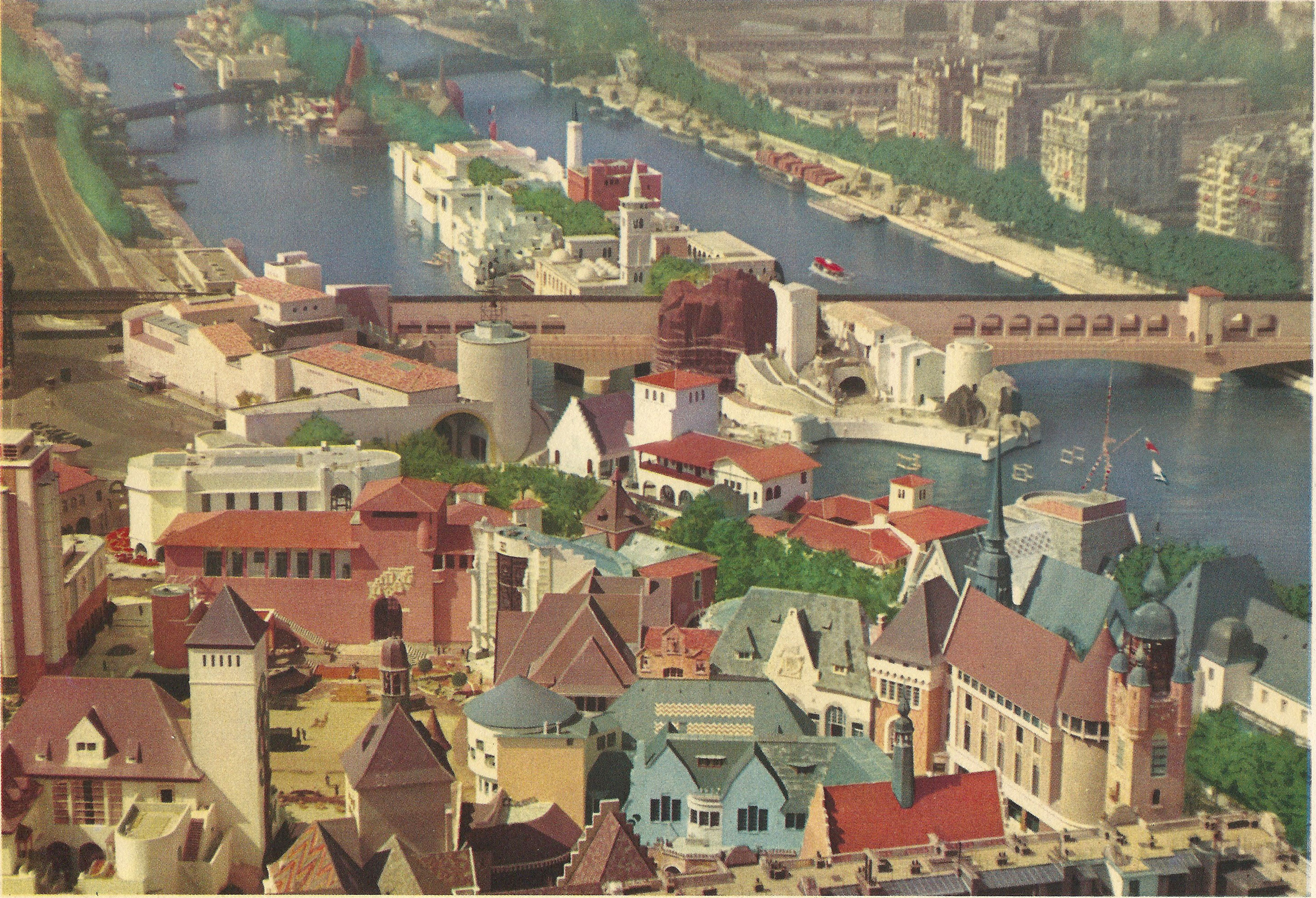 Exposition Internationale des Arts et Techniques dans la Vie Moderne (Paris-1937) , centre des provinces françaises